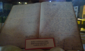 Buku Catatan Guru Bertugas Mingguan 1974-1975